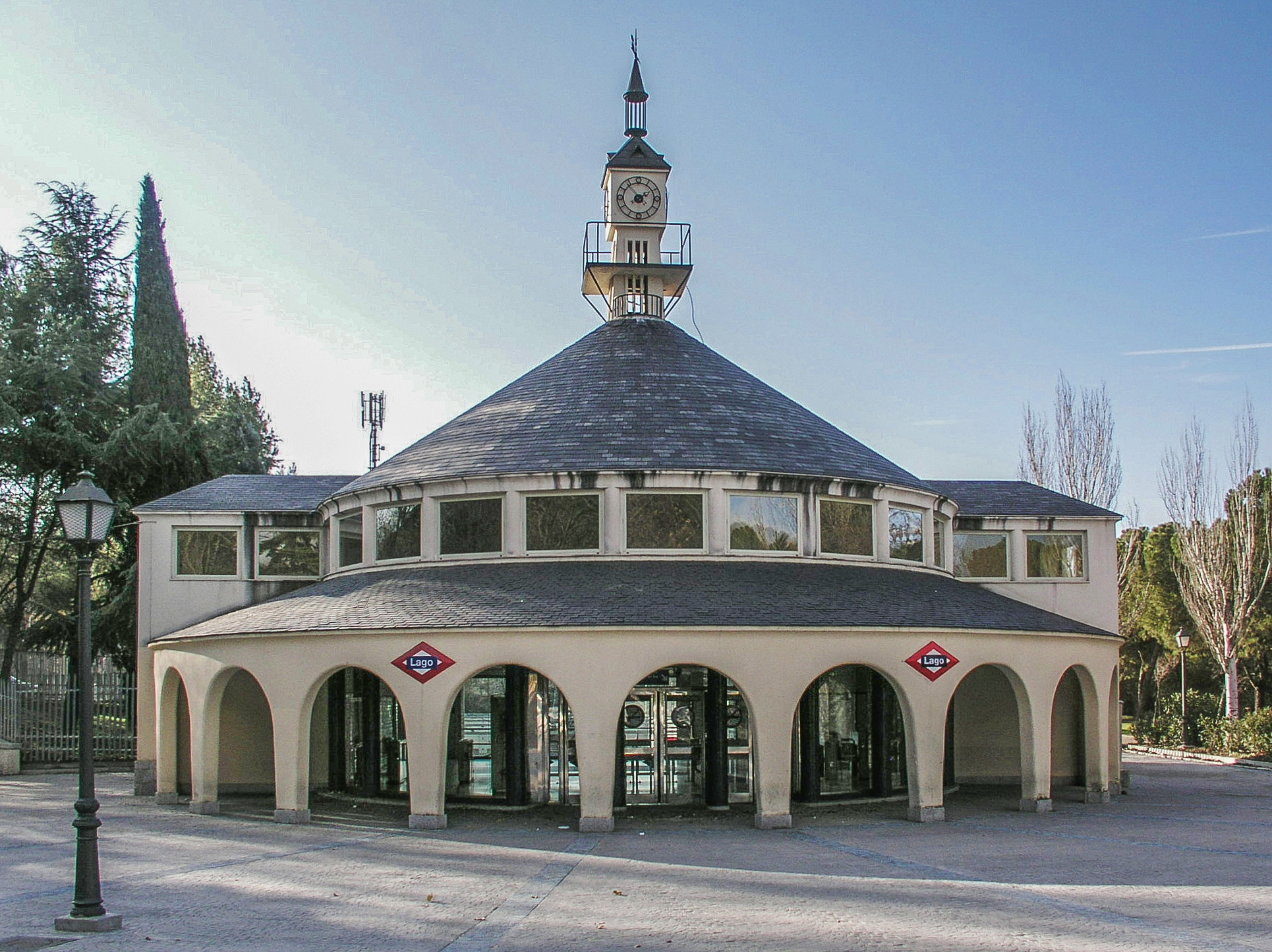 Estación de Metro de Lago, Casa de Campo, Madrid, Spain